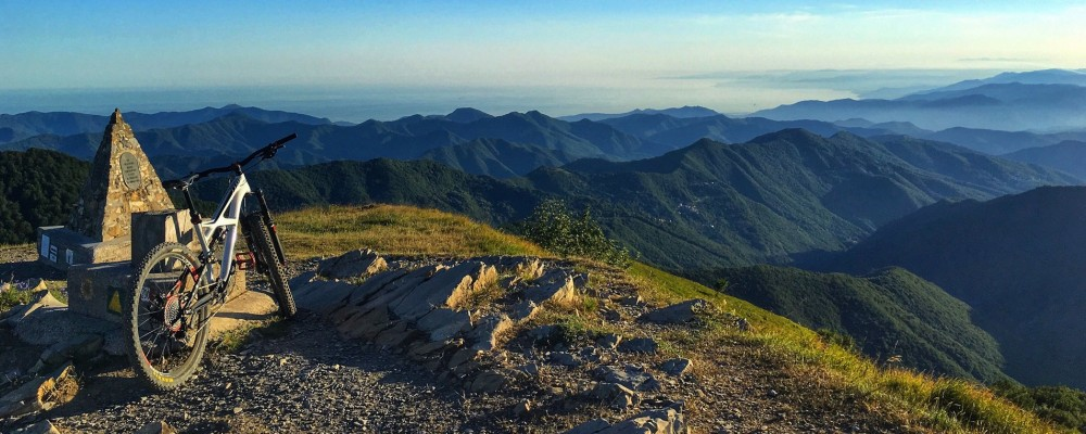 Bike antola